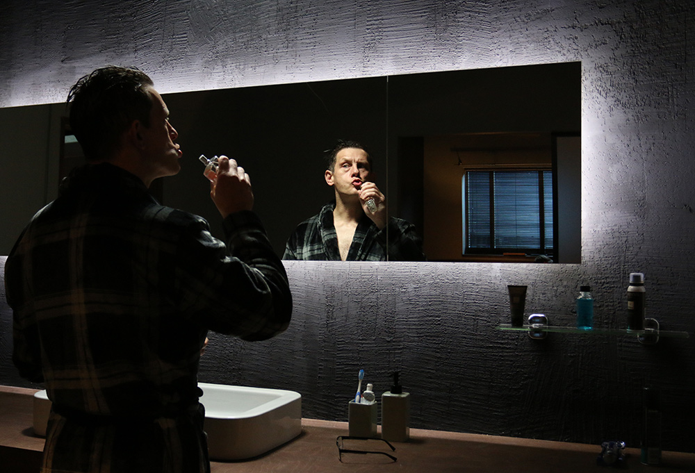 Luuraja